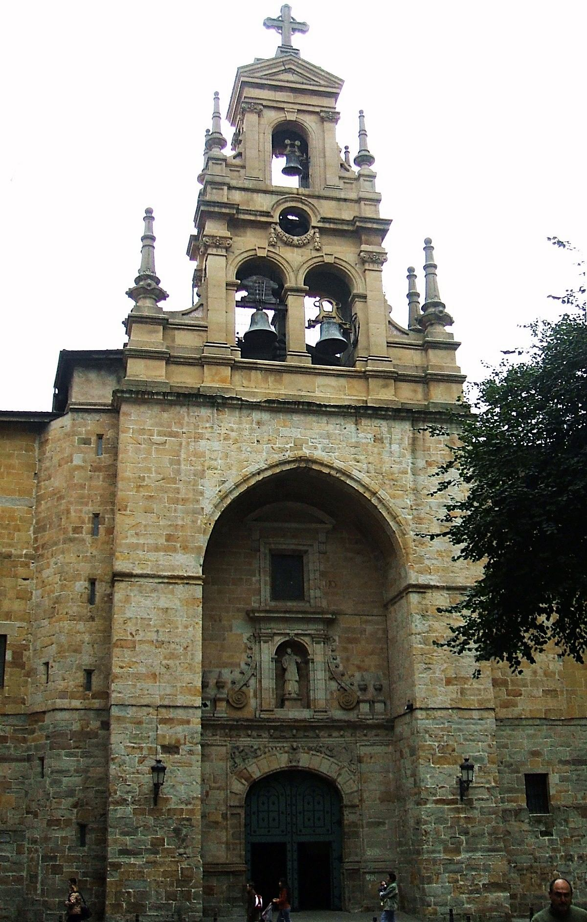 Parroquia de San Vicente Mártir de Abando, Bilbao, País Vasco, España/Spain